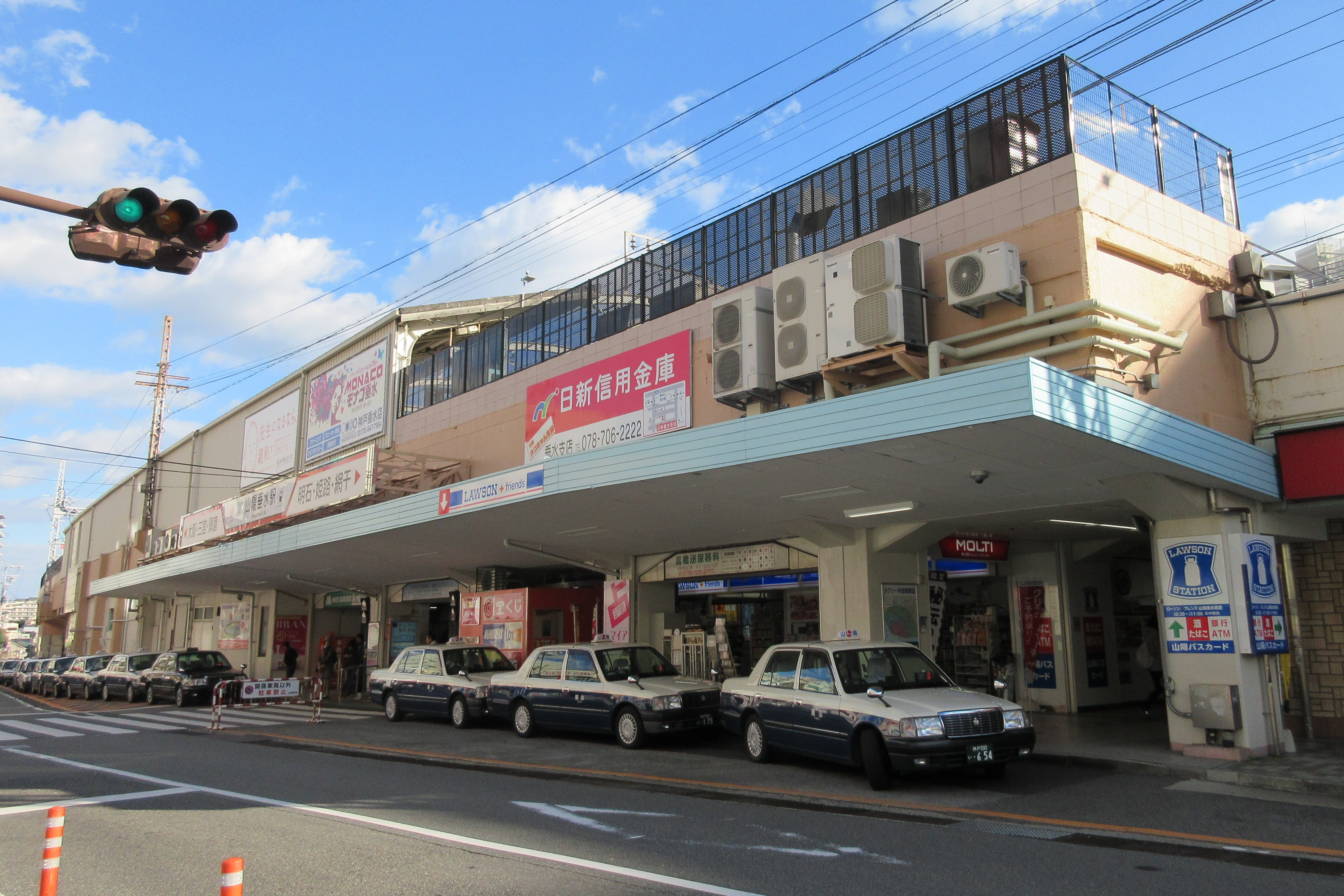 山陽垂水駅